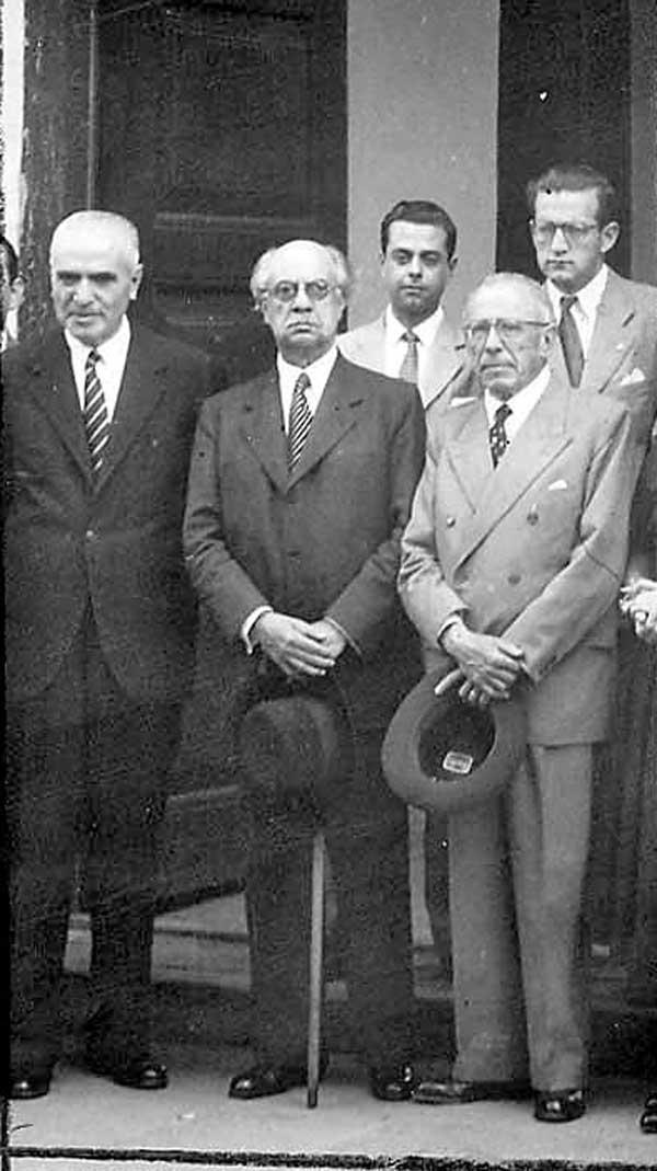 Los ex- gobernadores de Tucumán, Miguel Campero y Miguel Critto junto al escritor Ricardo Rojas en la Casa de la Independencia de San Miguel de Tucumán. Año 1954.